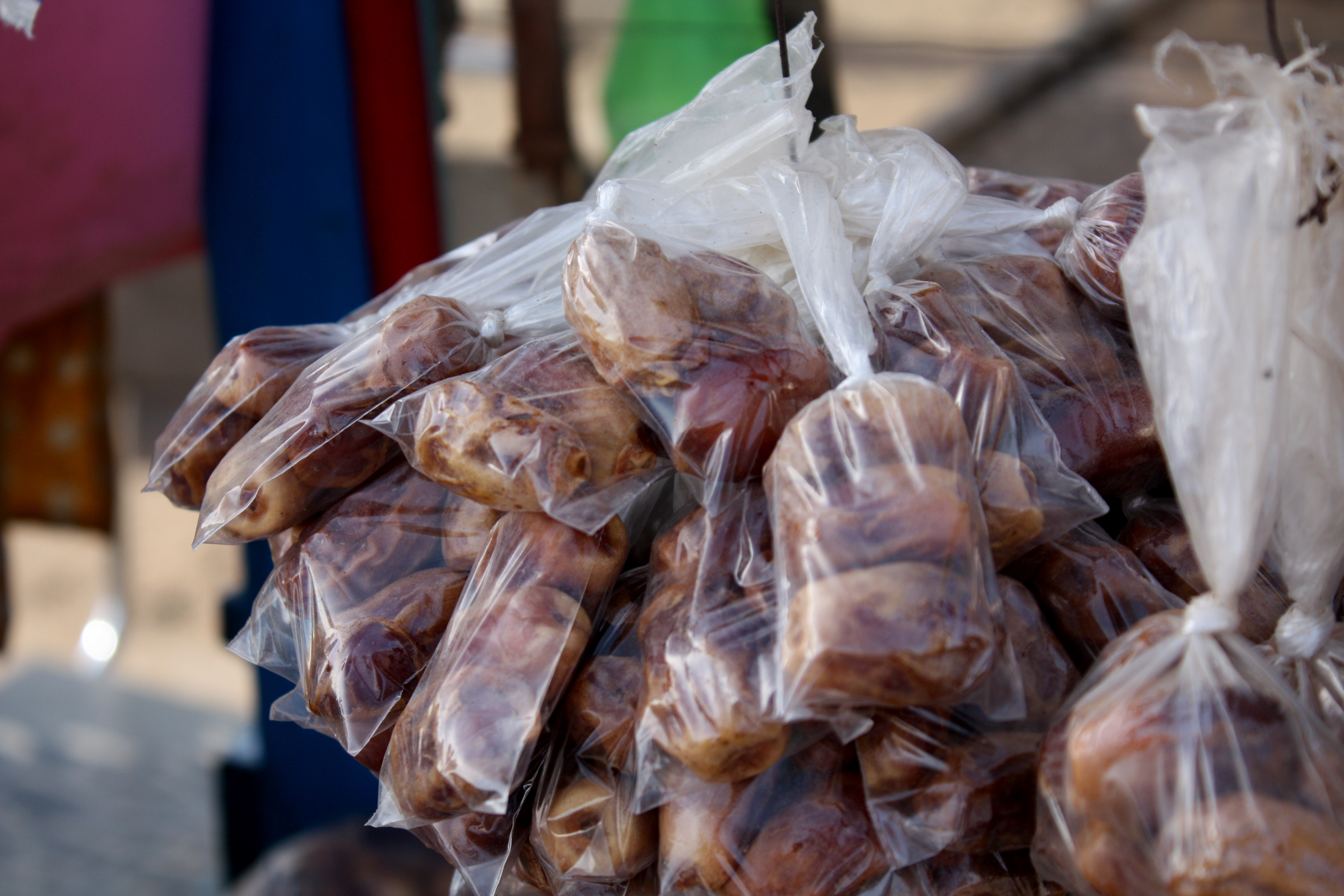 Vente de dattes à Dakar (Sénégal) à l'occasion du Ramadan